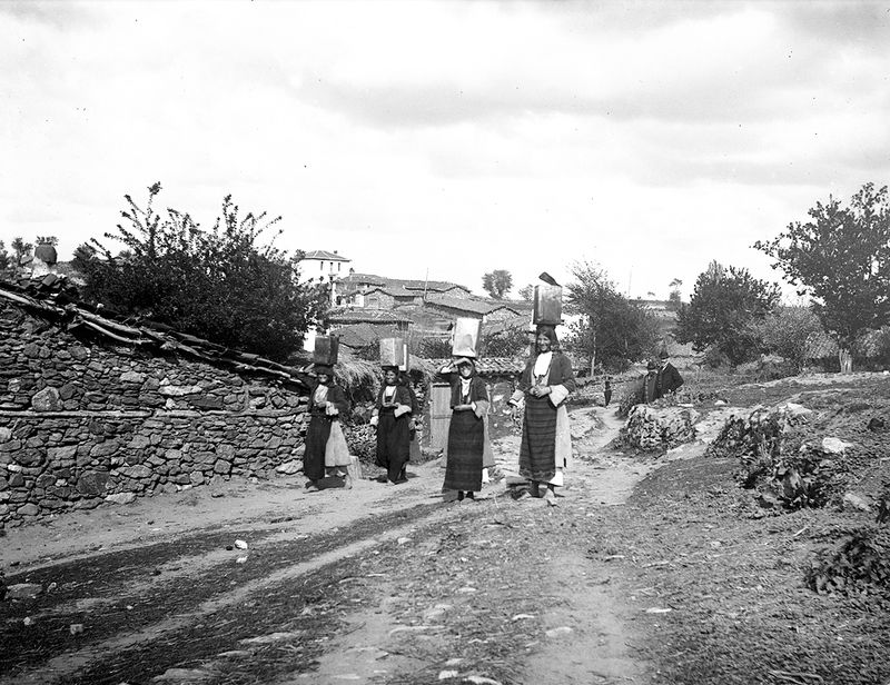 Село Негован, Лъгадинско.